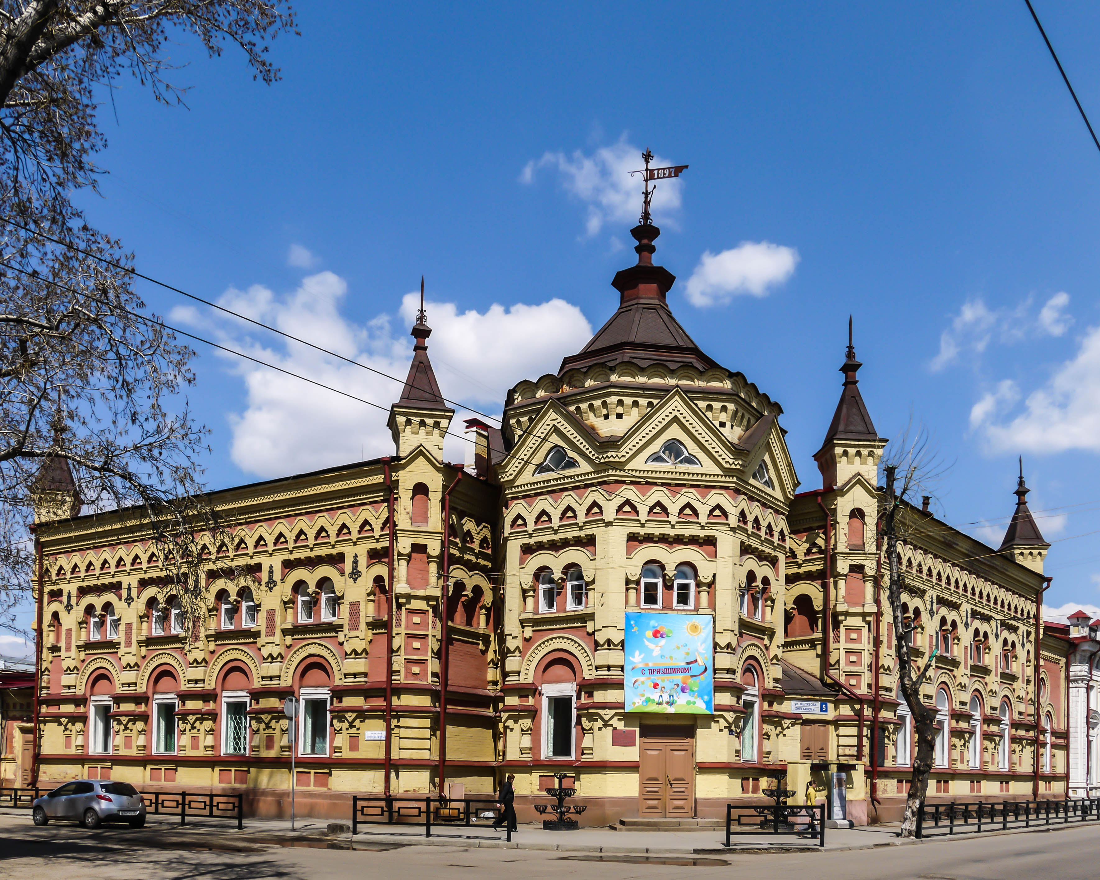 Иркутск. Усадьба купцов Второвых. 1897 г. Ныне здание дома пионеров. Адрес: ул. Желябова 5.